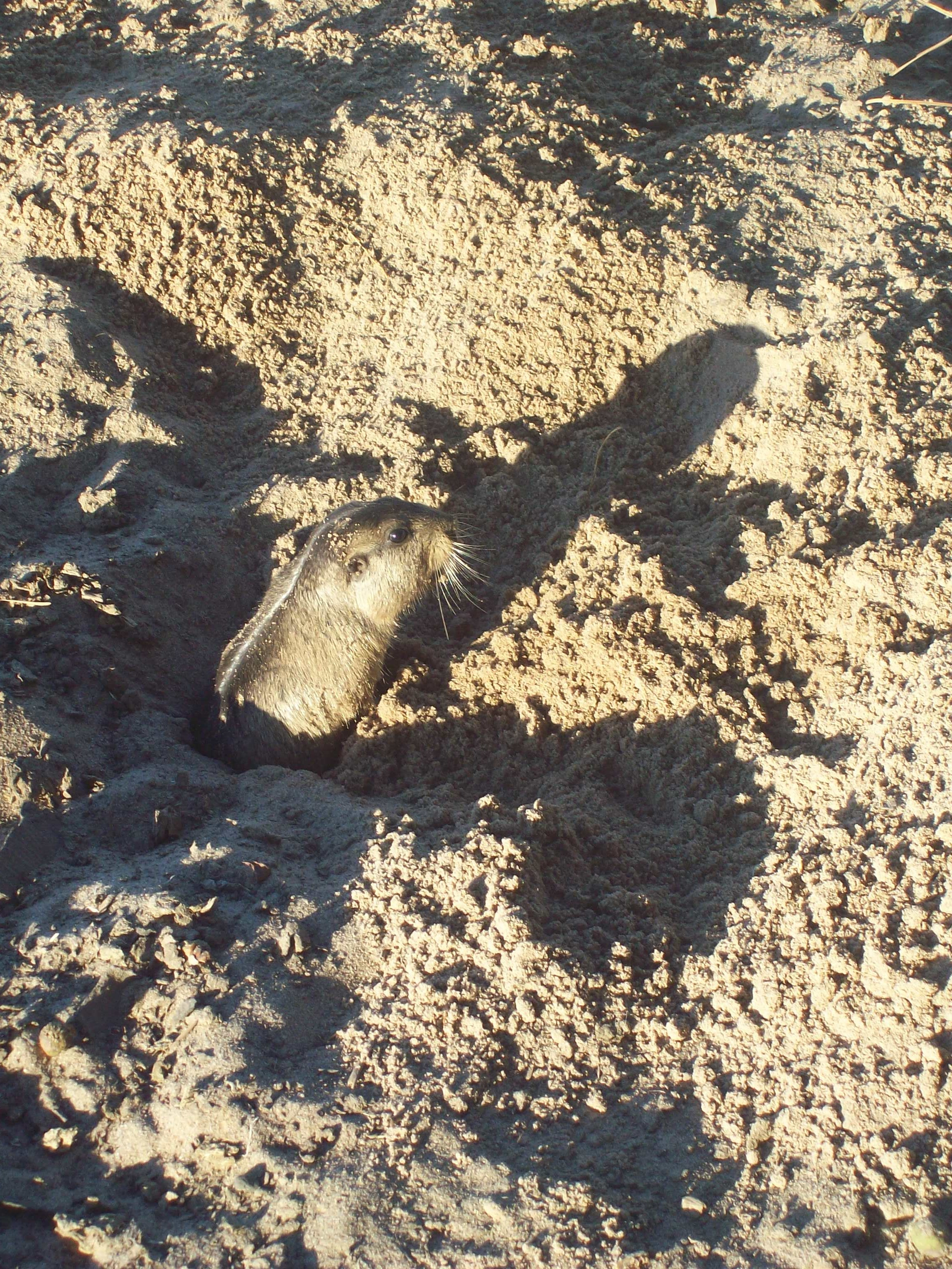 Anguyá-tutú escarbando en la tierra. Fotografiá tomada en Goya, Corrientes, Argentina